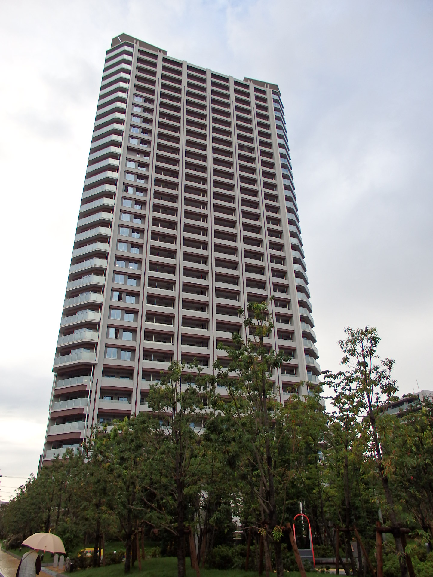 サウスゲートタワー川口